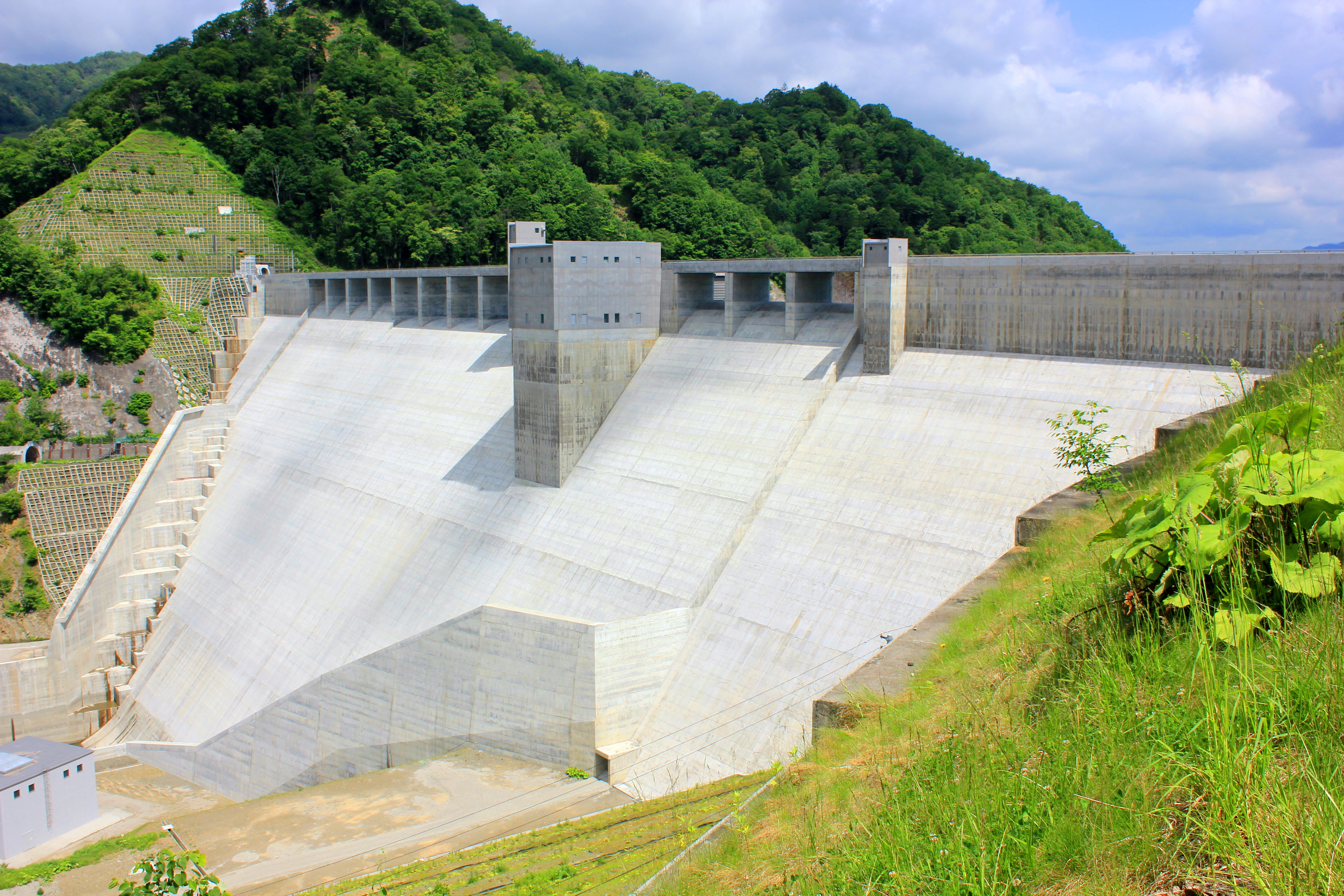 夕張シューパロダム（北海道・夕張川。国土交通省北海道開発局管理。2015年撮影）